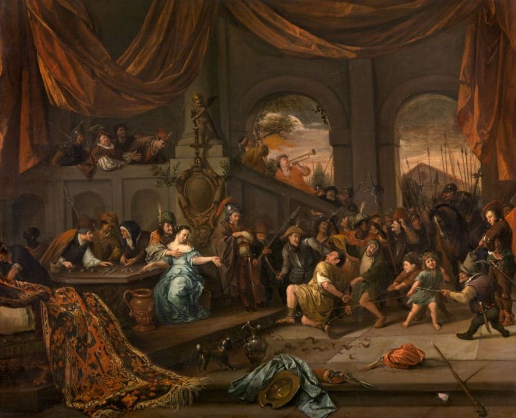 Jan Steen - De bespotting van Simson - Koninklijk Museum voor Schone Kunsten Antwerpen